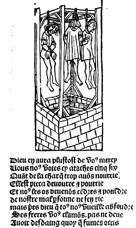 Le grant testament Villon et le petit . Editeur : J. Trepperel (Paris 1500)